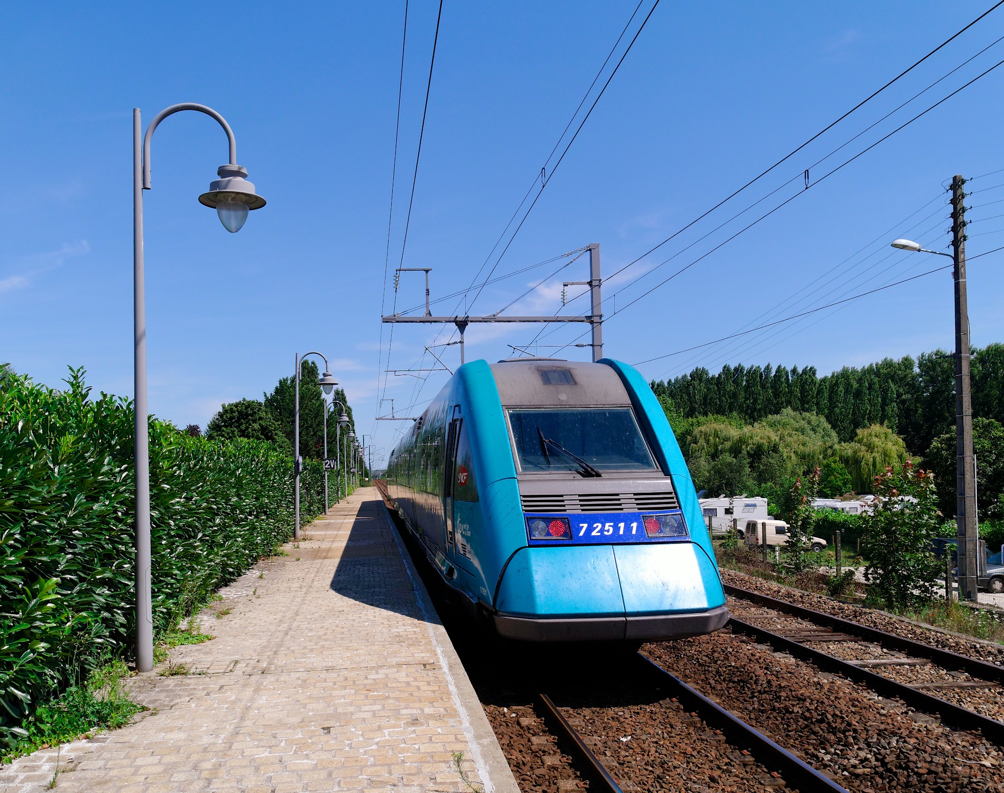 Diesel train / Chenonceaux, France